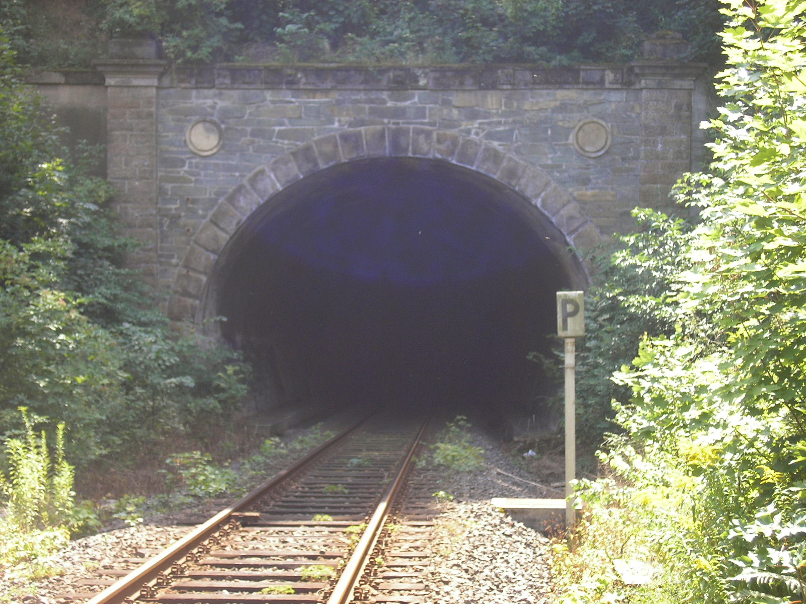 Das Nordportal des Schlossbergtunnels in Greiz (Thüringen).